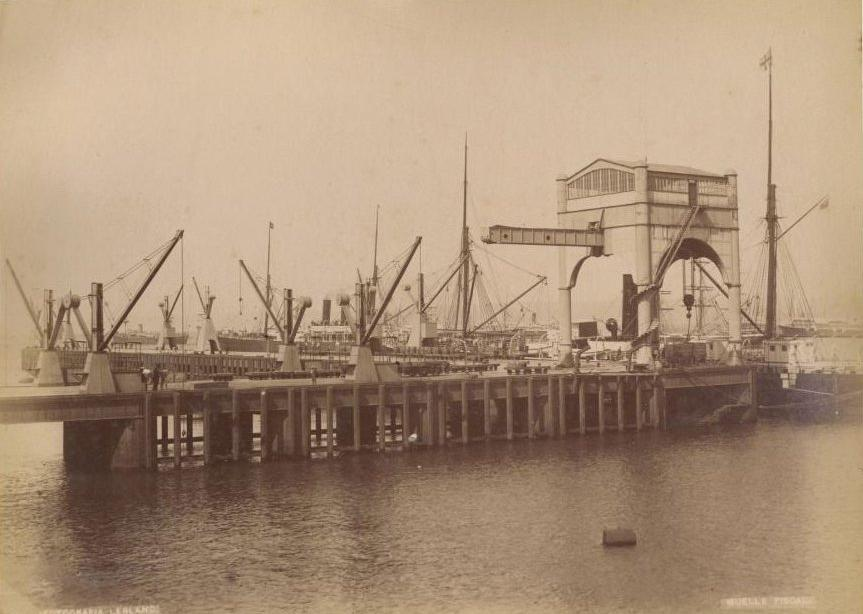 Muelle Fiscal de Valparaíso en 1888, Fotografías de Felix Leblanc.